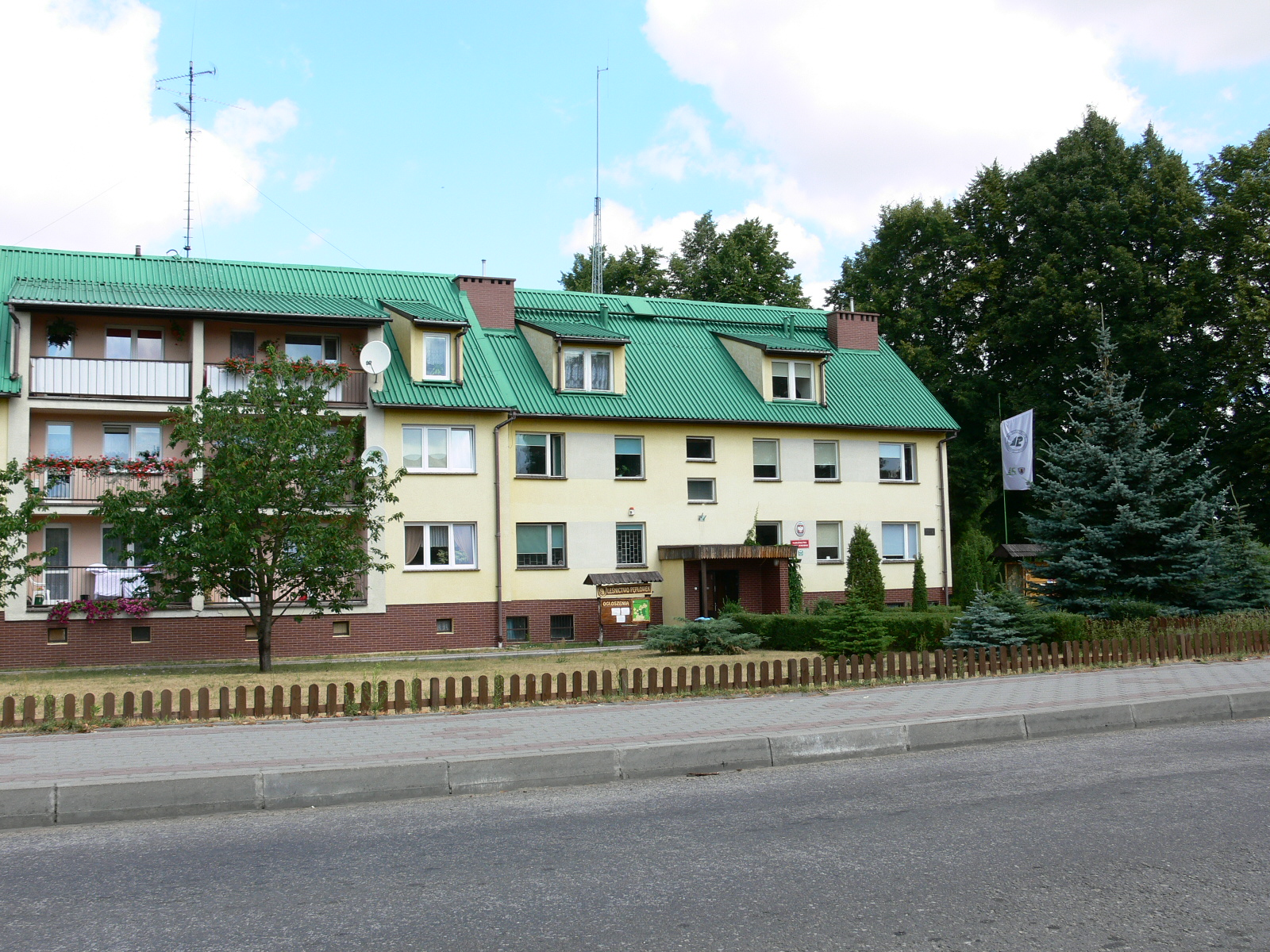 Kalisz Pomorski - budynek nadleśnictwa Kalisz Pomorski